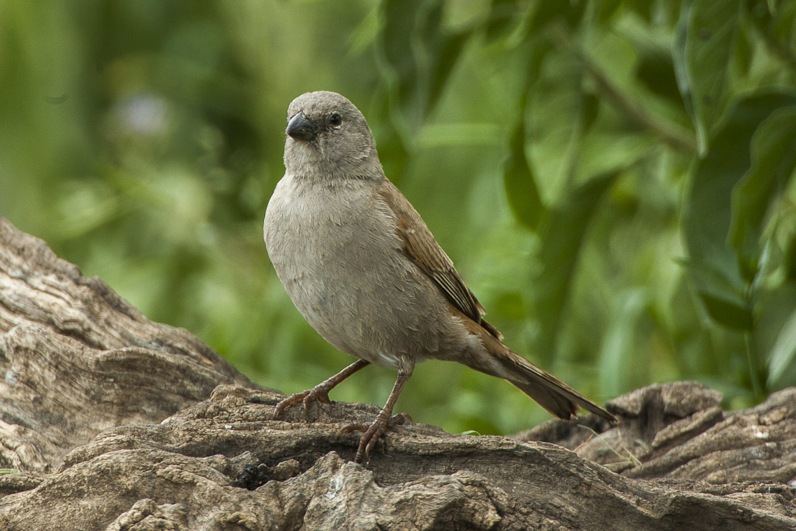 Swahili Sparrow - Tanzania_0180